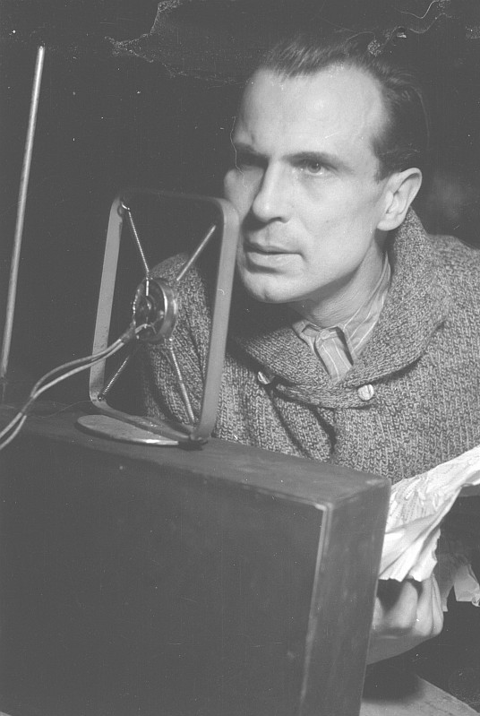 Original image description from the Deutsche FotothekSzenenbilder